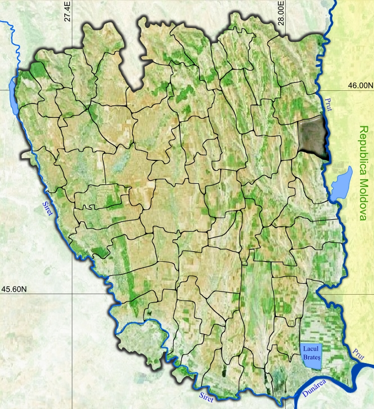 Oancea jud Galati.